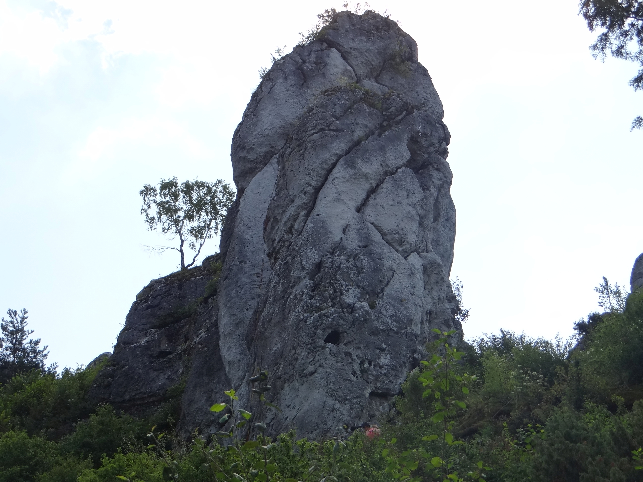 Skała Mniszek w grupie Mirowskich Skał. Widok od północy